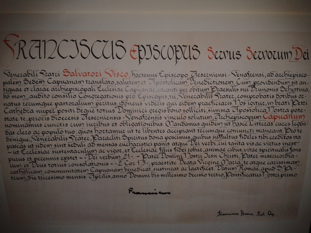 Nomina Salvatore Visco Arcivescovo